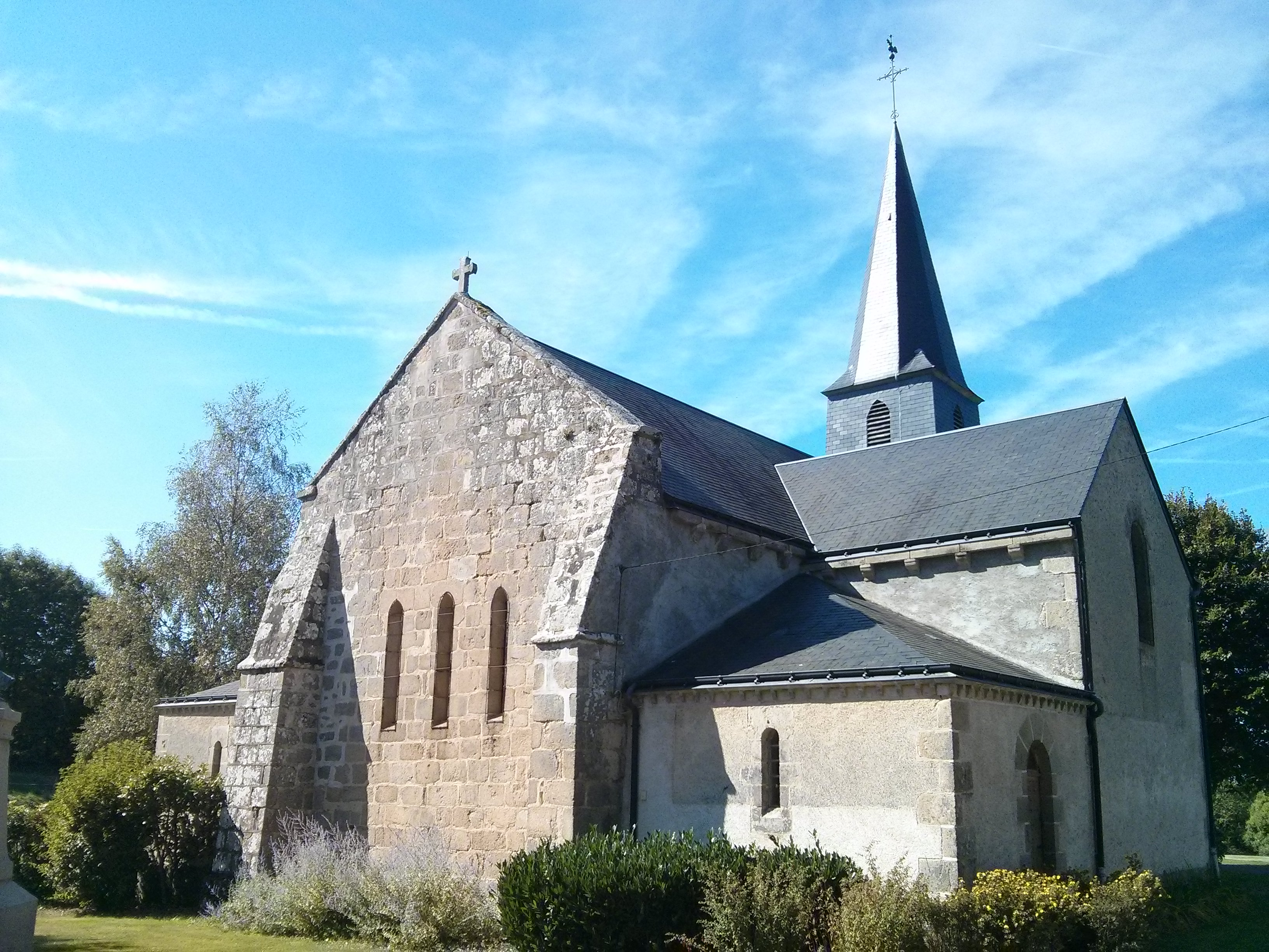 Vue de l'arrière de l'église du village de la Forêt-du-Temple, Creuse, Limousin, France. C'est l'ancienne chapelle de la commanderie templière.